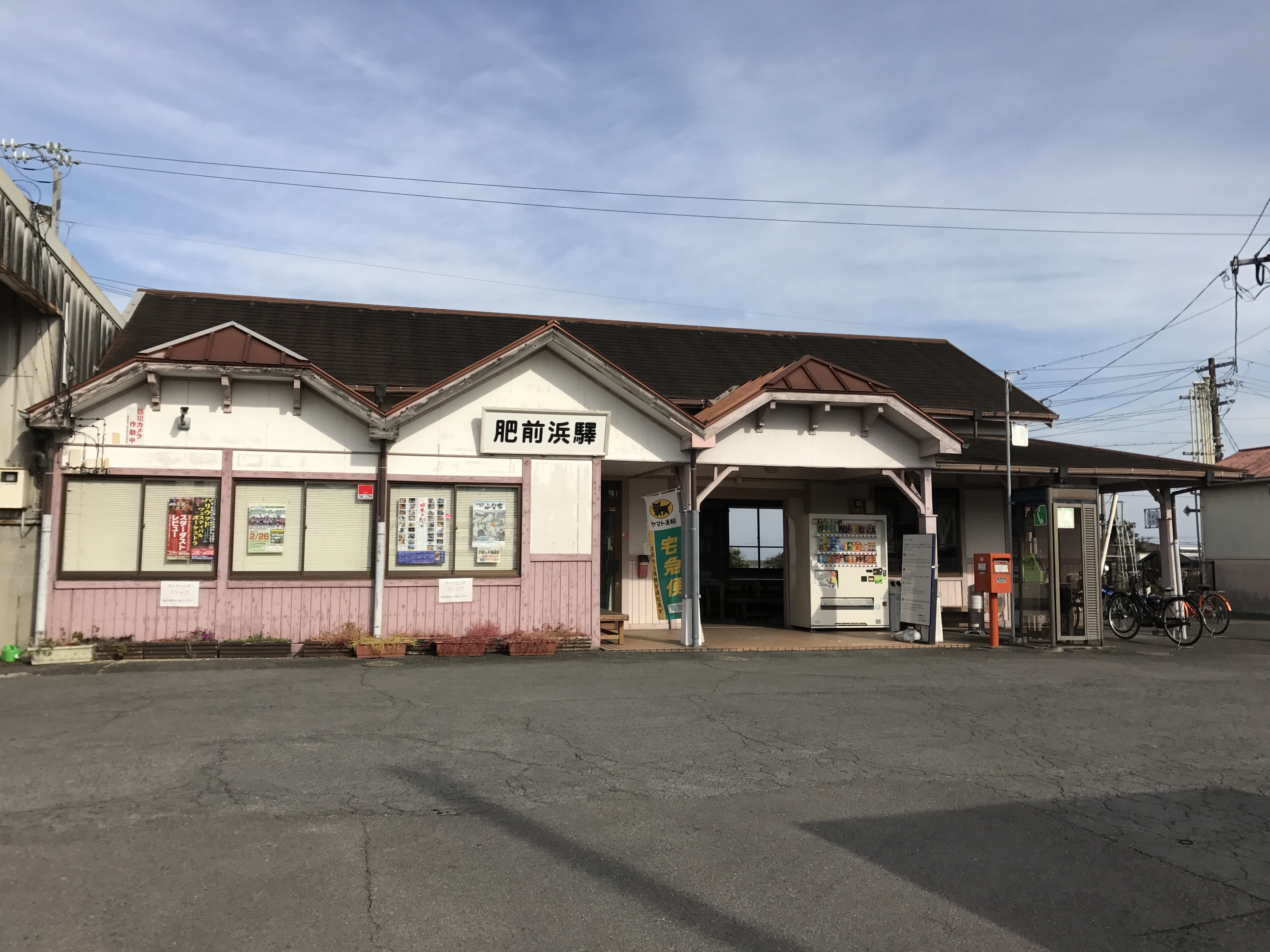 肥前浜駅駅舎